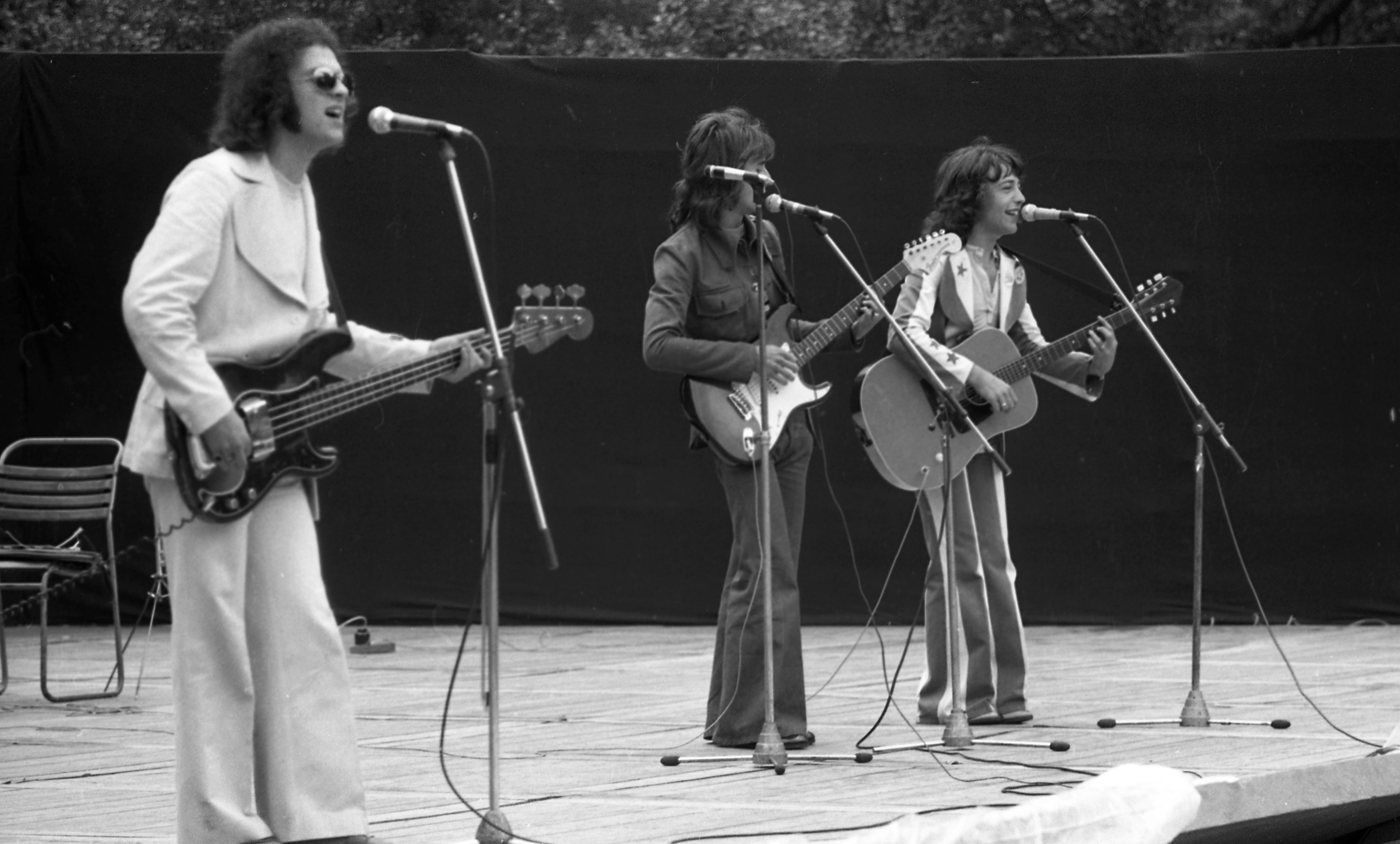 Újszegedi Szabadtéri Színpad. Hungária együttes (Sipos Péter, Kékes Zoltán, Fenyő Miklós) Location: Hungary, Szeged Tags: celebrity Title: Újszegedi Szabadtéri Színpad. Hungária együttes (Sipos Péter, Kékes Zoltán, Fenyő Miklós)